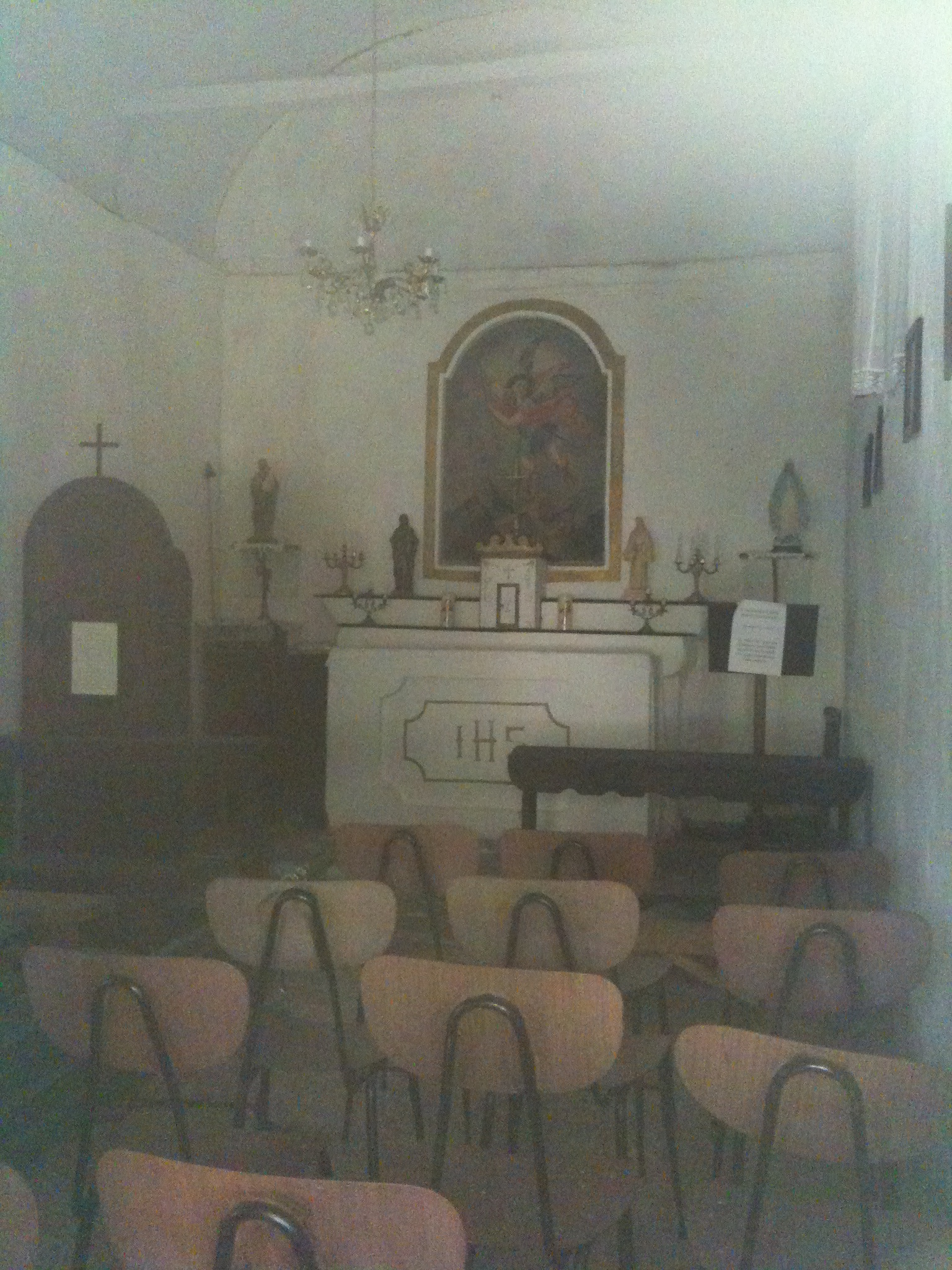 Cappella di San Michele in Sassello SV - veduta interna - (Italy)